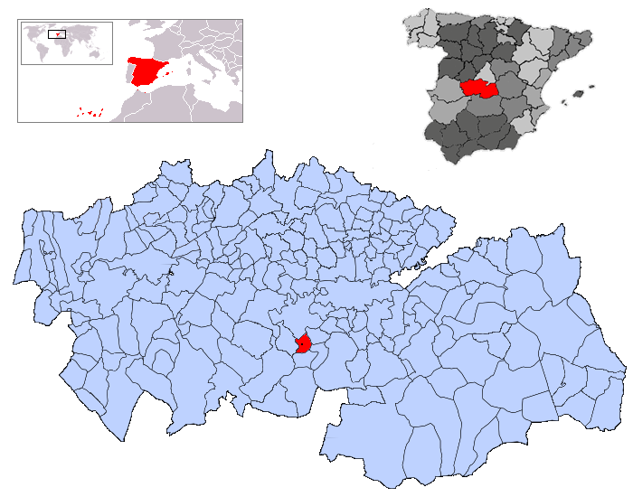 Totanés en la provincia de Toledo